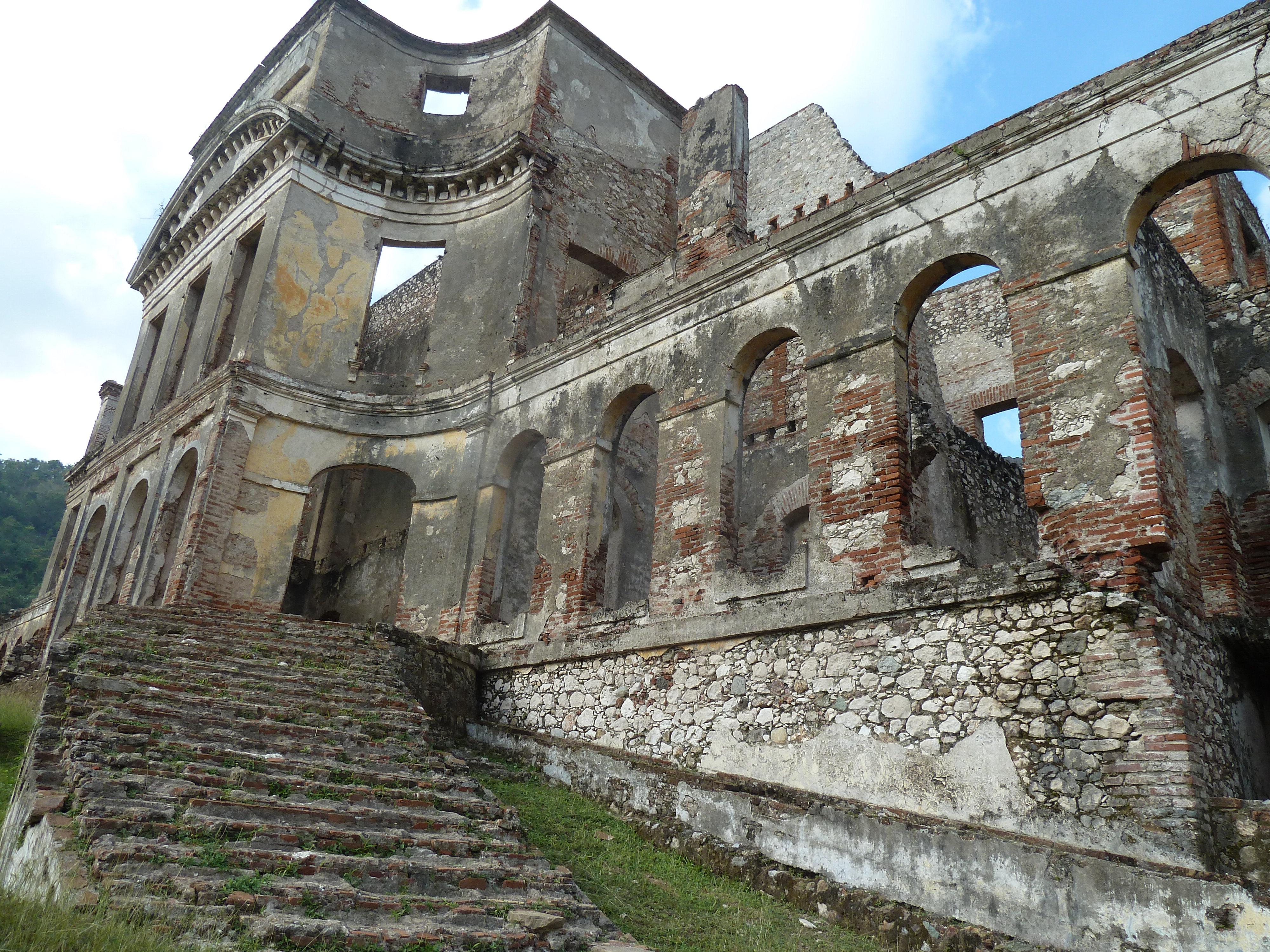 Les ruines du palais Sans-Souci, construit par le roi Henry Ier, sont situées dans le village de Milot, à une quinzaine de kilomètres de la ville du Cap-Haïtien.